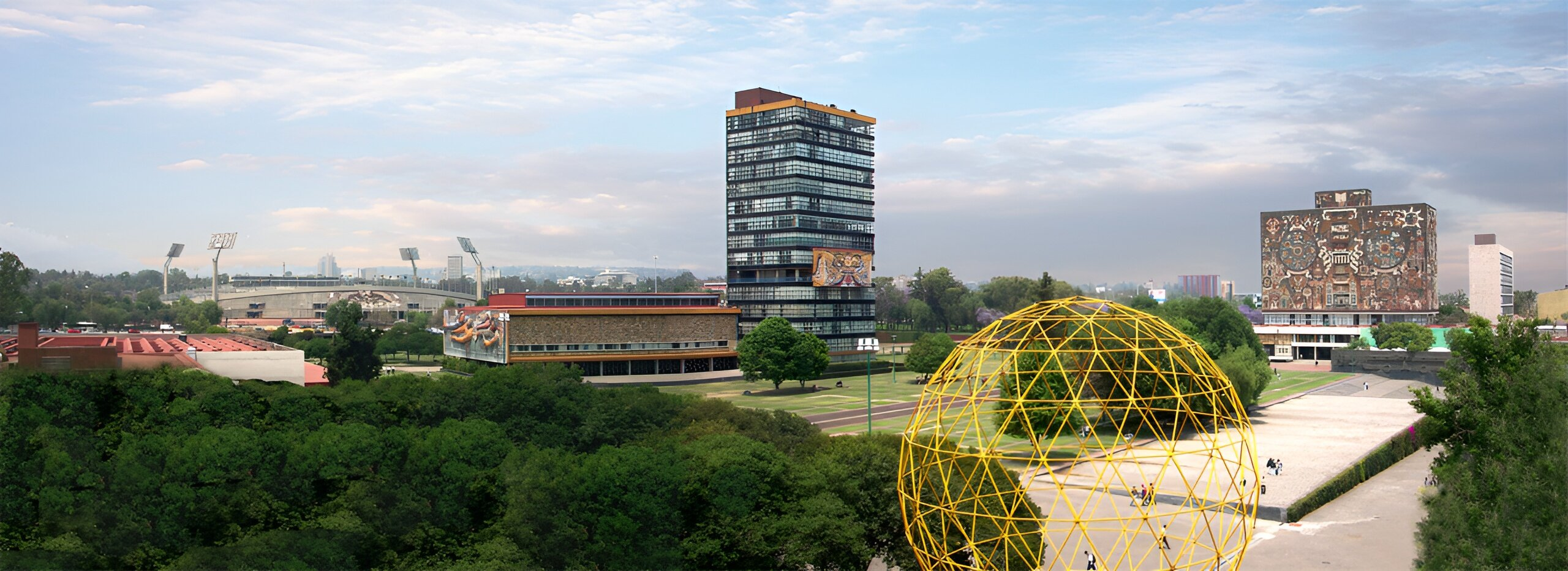 Vicente Peña Herrera